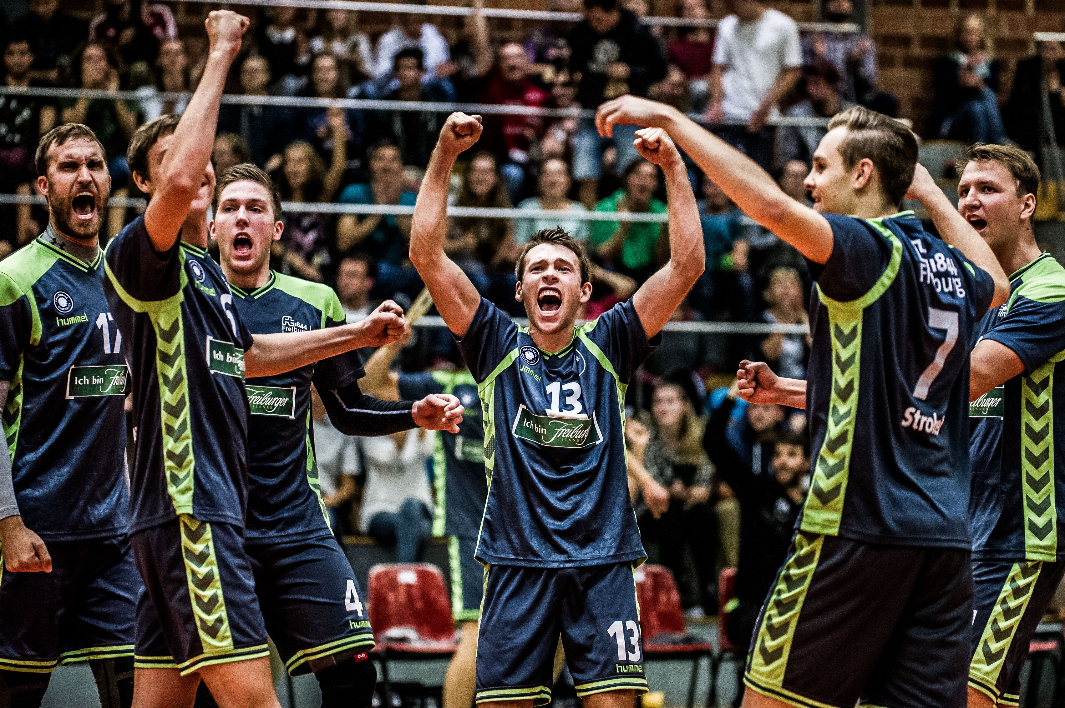 Die erste Mannschaft der Volleyballabteilung spielt seit 2001 in der 2. Bundesliga Süd.